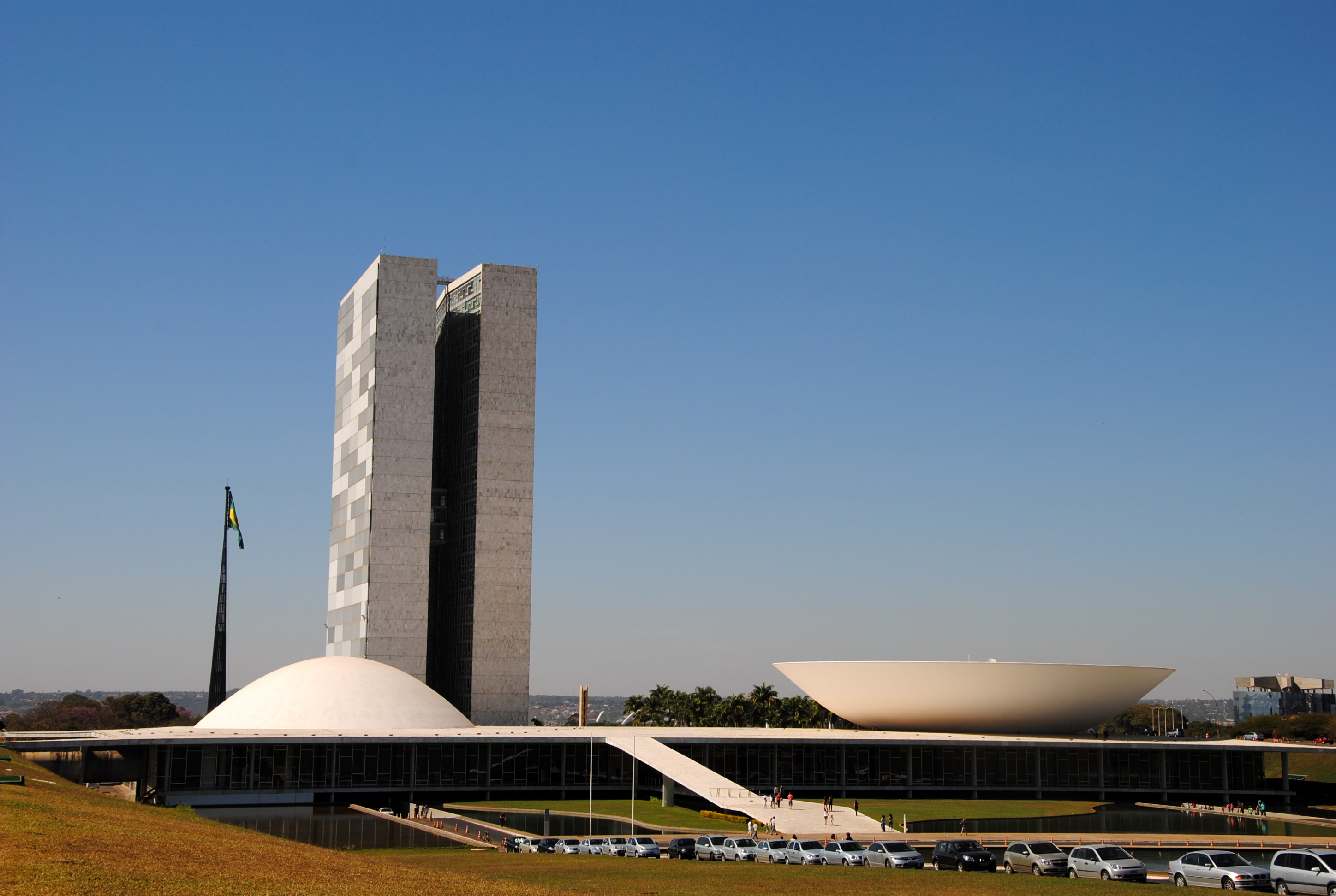 Sede do Congresso Nacional do Brasil em Brasília.